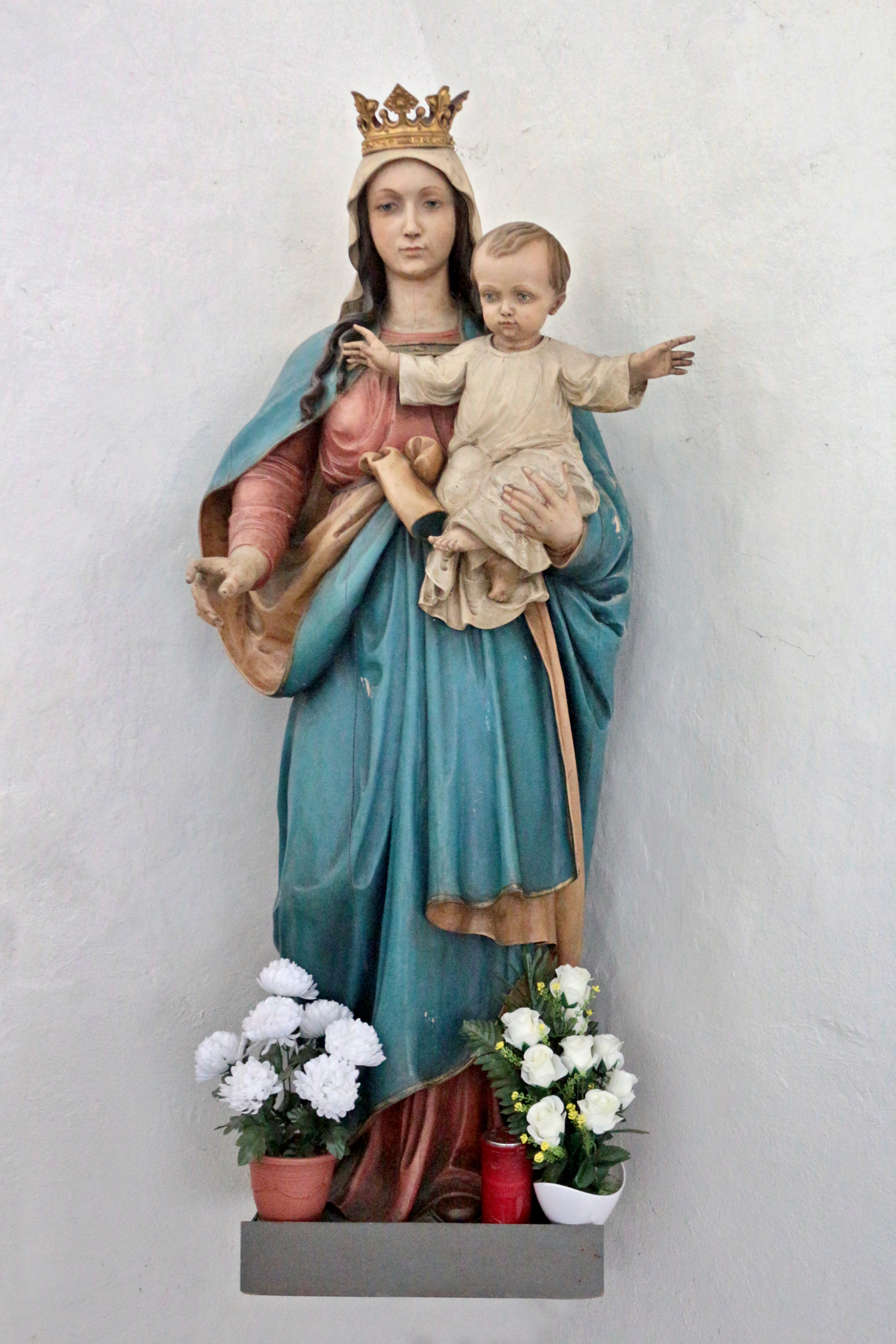 Sedlčany, kostel sv. Martina